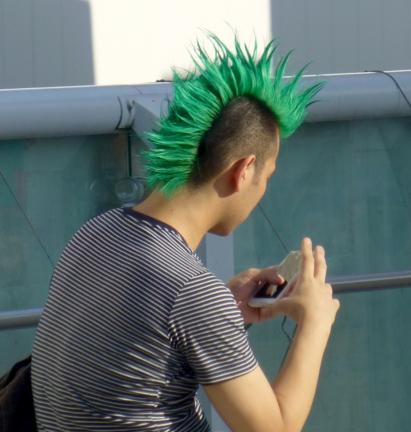 モヒカン刈り、北千住にて (Mohawk hair style in Kitasenju, Japan)